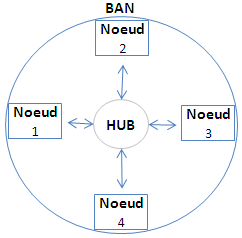 ReseauBAN